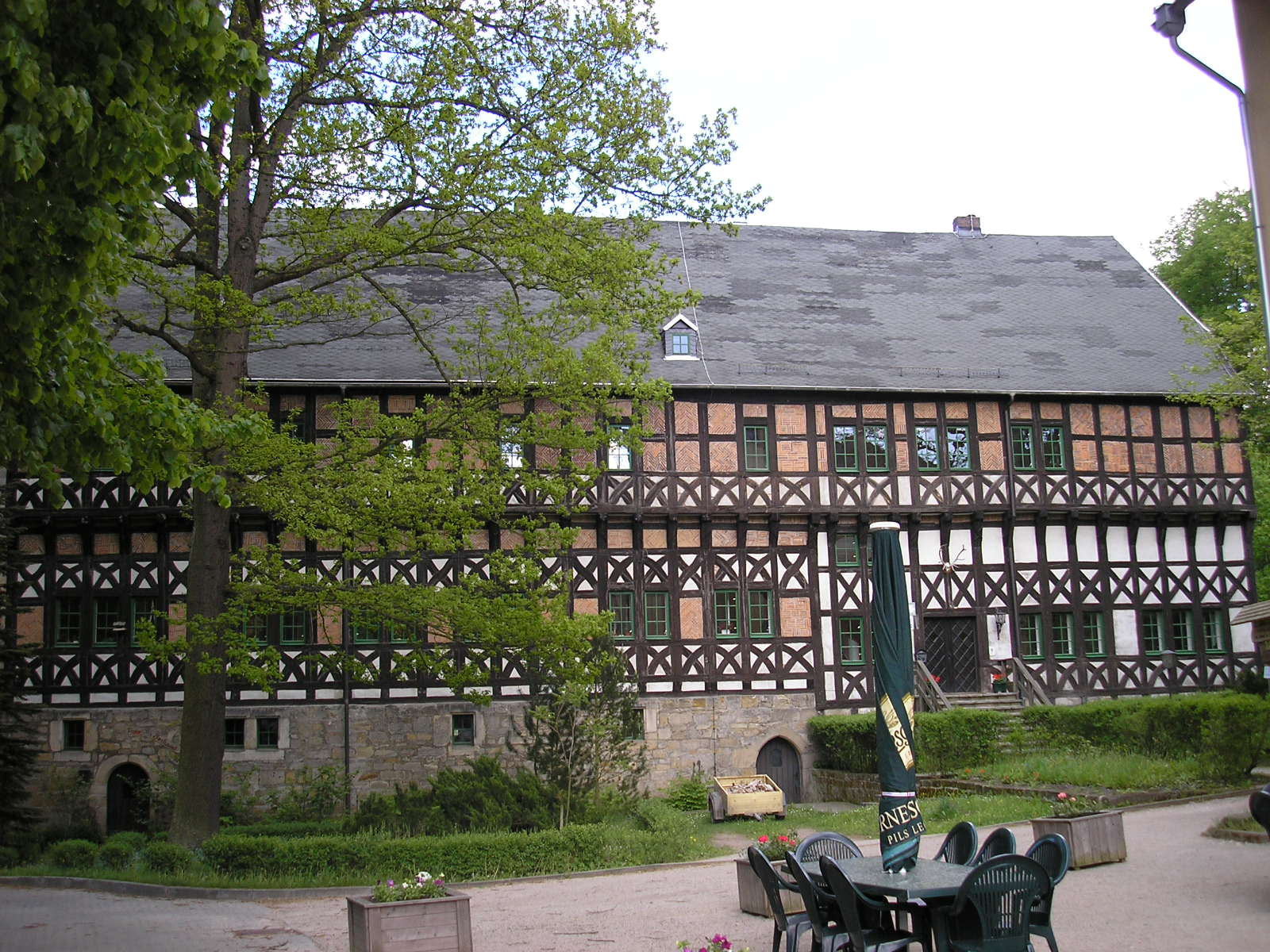 Das Thüringer Forstamt in Paulinzella.